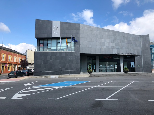 Casa do concello de A Fonsagrada ubicado en una amplia plaza frente al museo etnográfico comarcal y el parque Gil Portela (A Alameda)